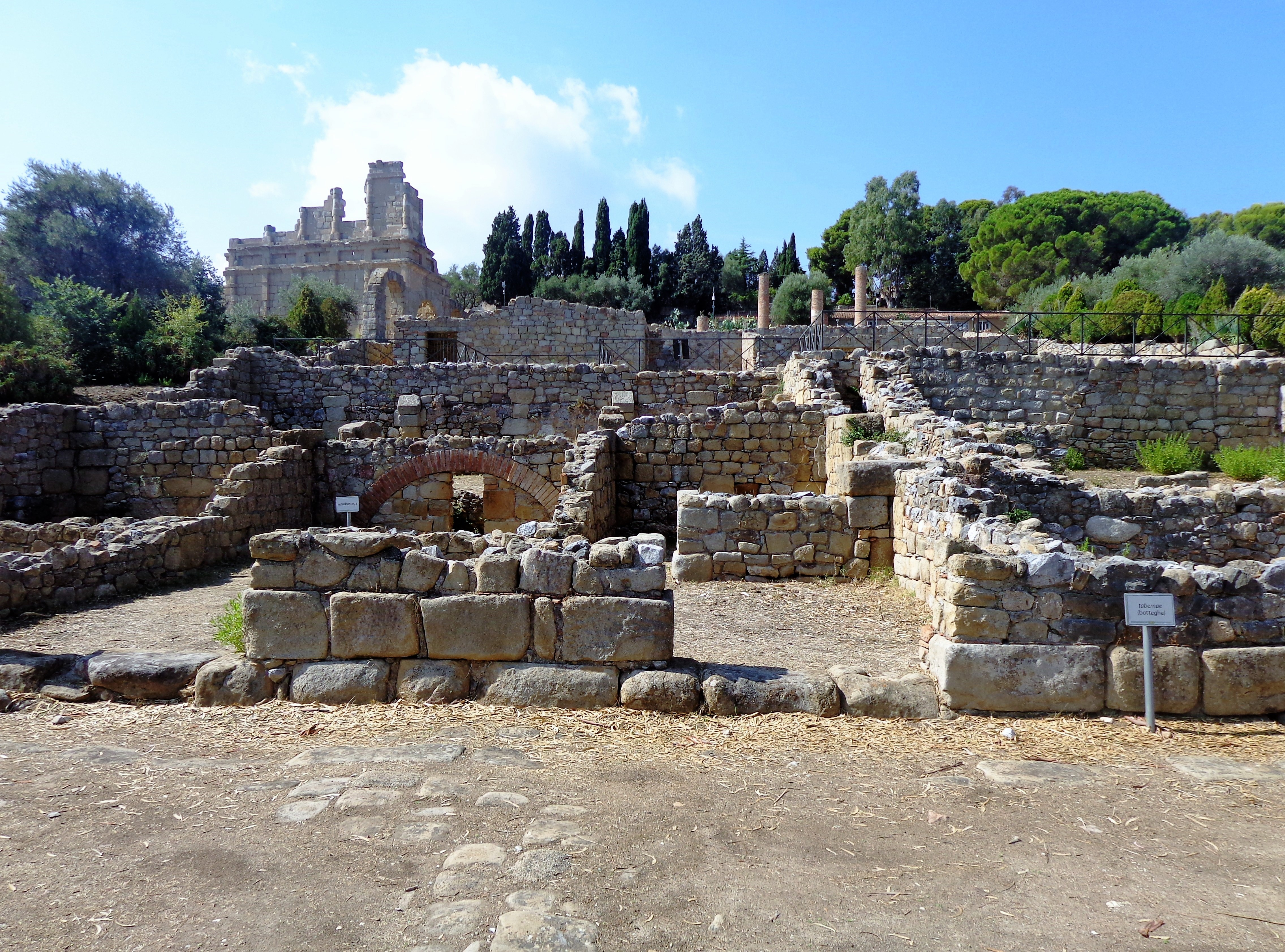 Domus. 08 settembre 2012 (Escursione Tindari, Santuario e area archeologica). Scatto fotografico altresì presente negli album caricati sui profili personali di Facebook, Panoramio, Google, etc.